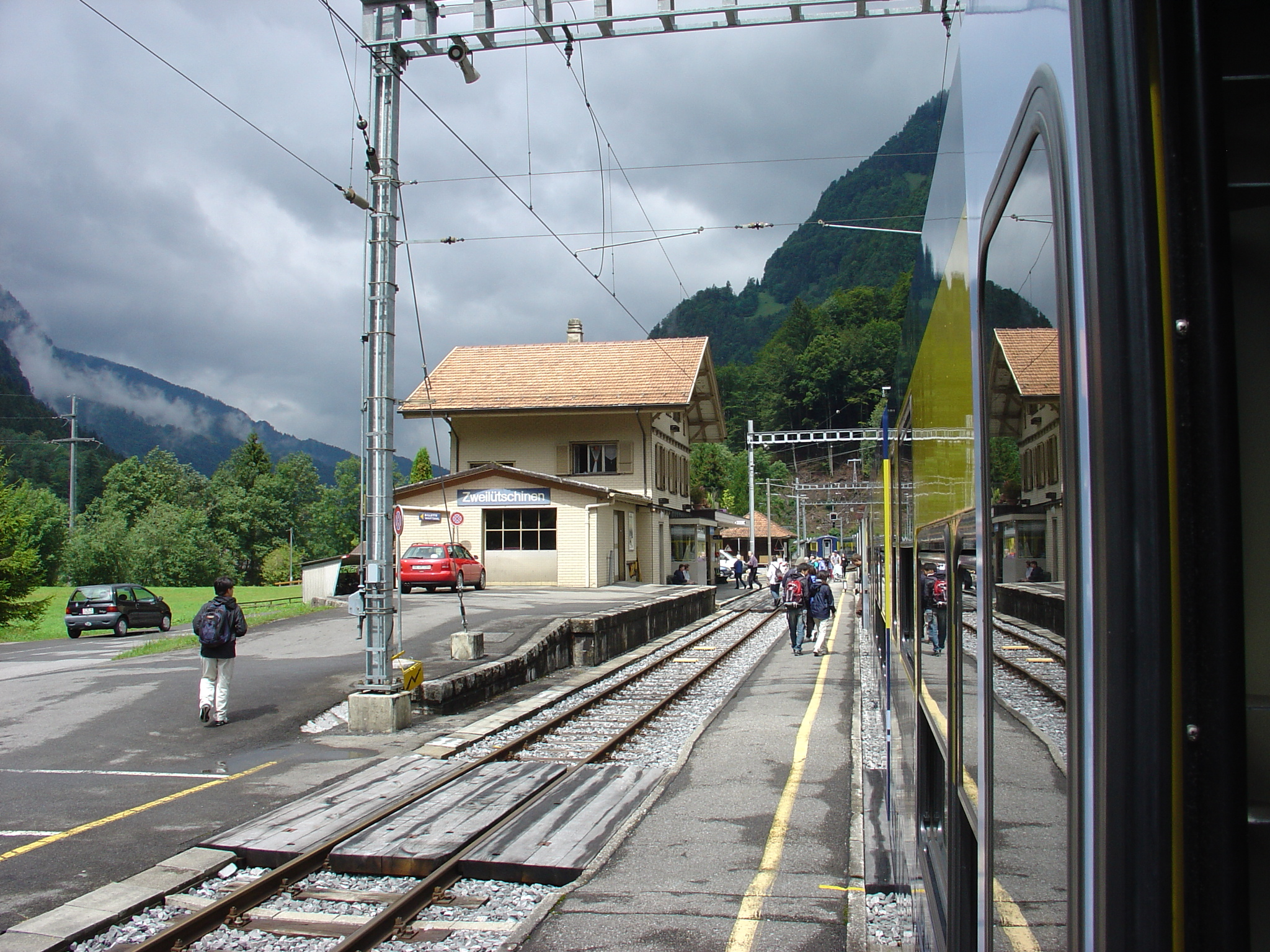 Berner Oberland-Bahn Zweilütschinen Station